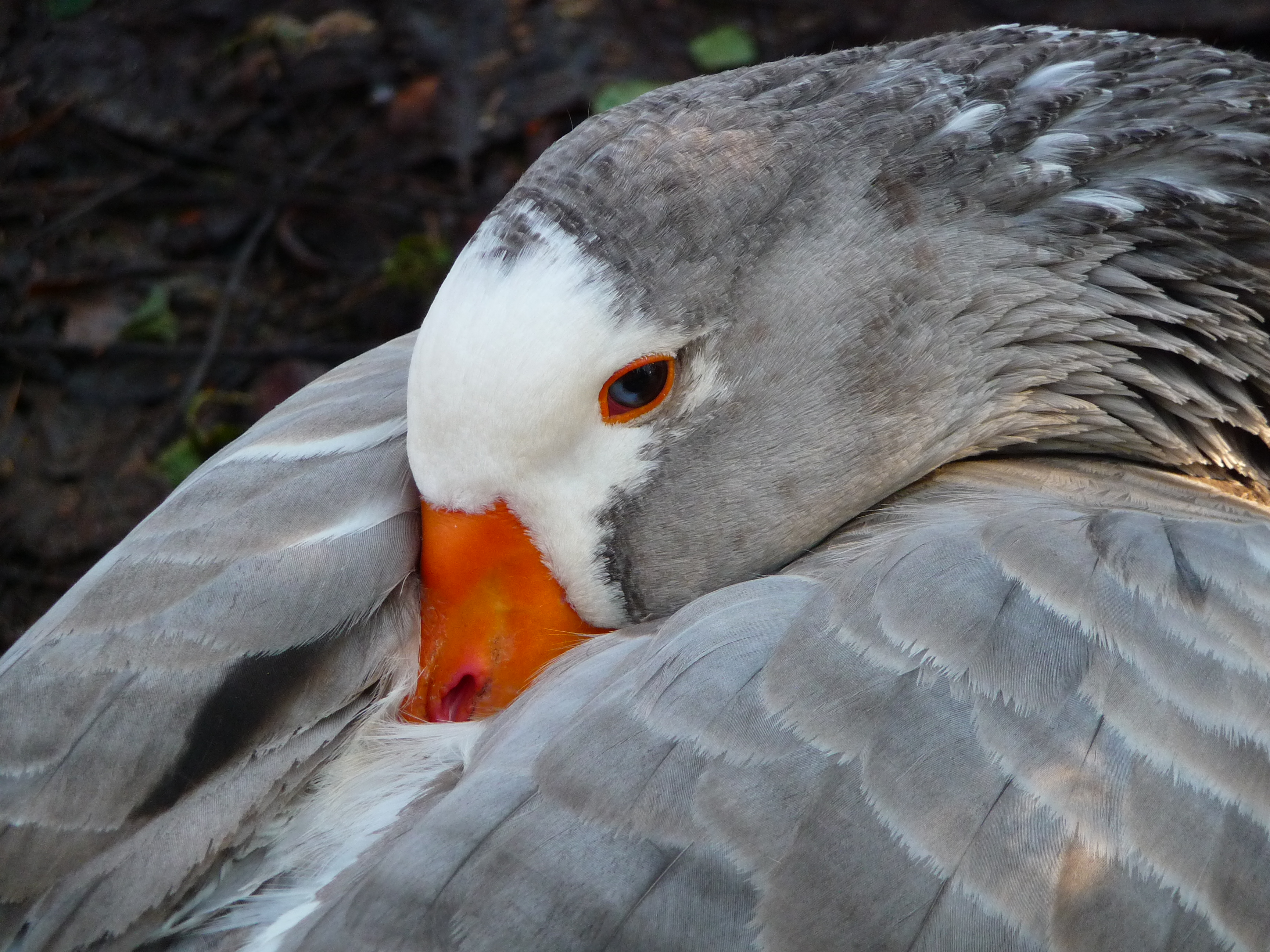 Hausgans (Detailaufnahme)